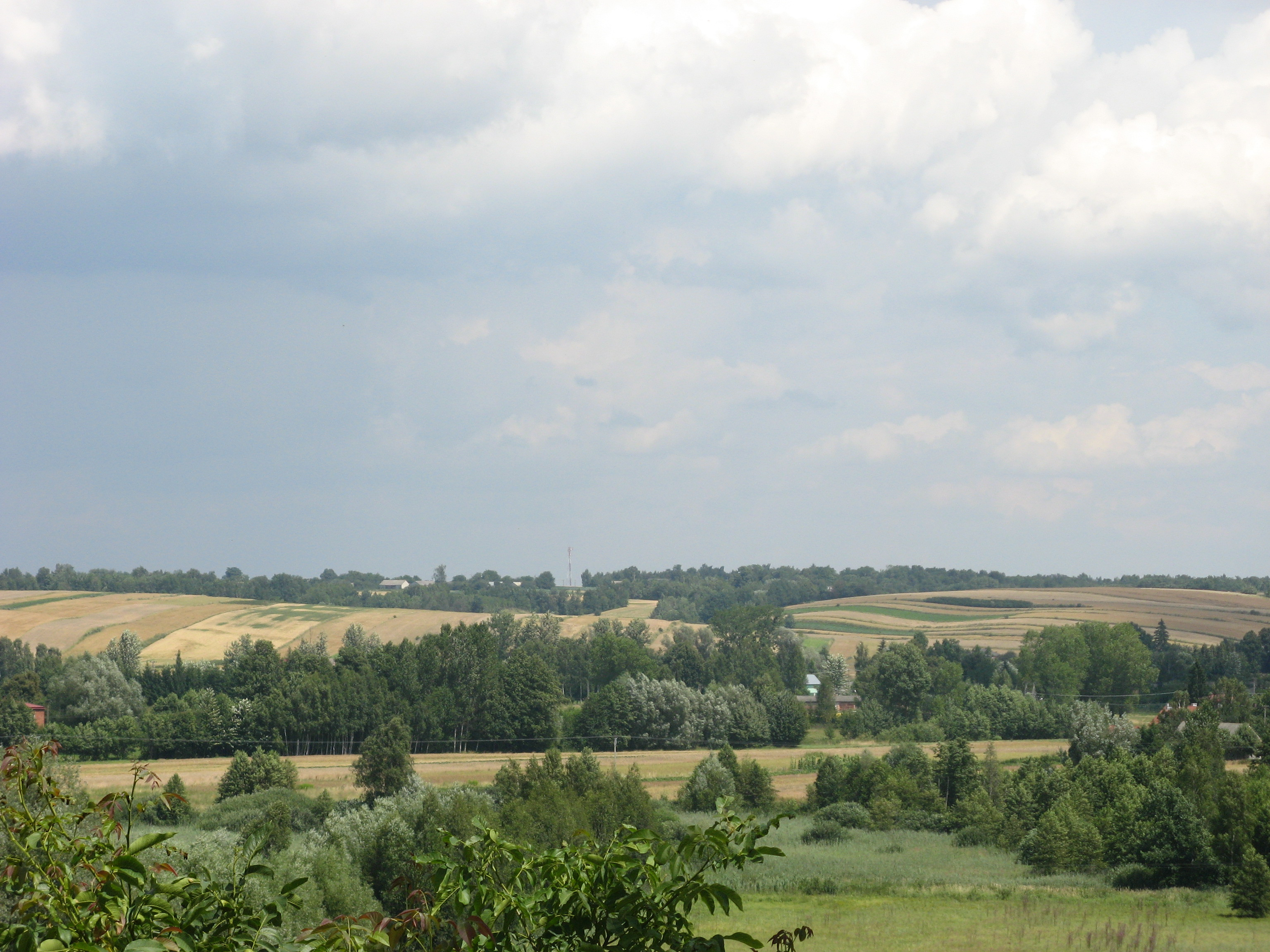 widok z murów kościoła św. Antoniego w Radecznicy